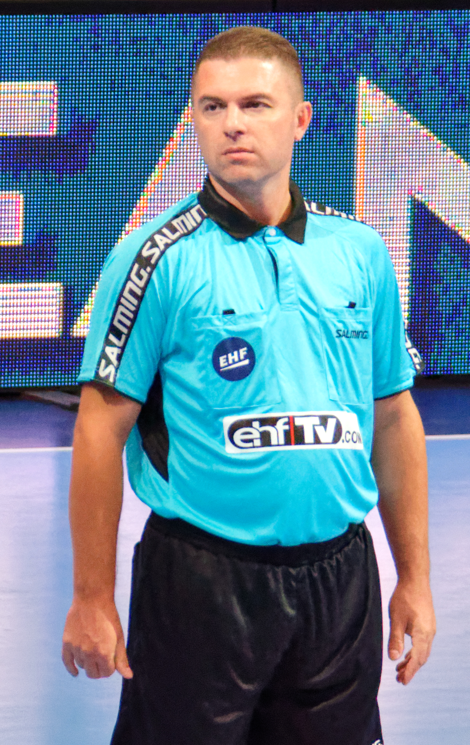 Rencontre de phase de groupe de la Ligue des champions 2016-17. A Coubertin, le 2 octobre 2016.